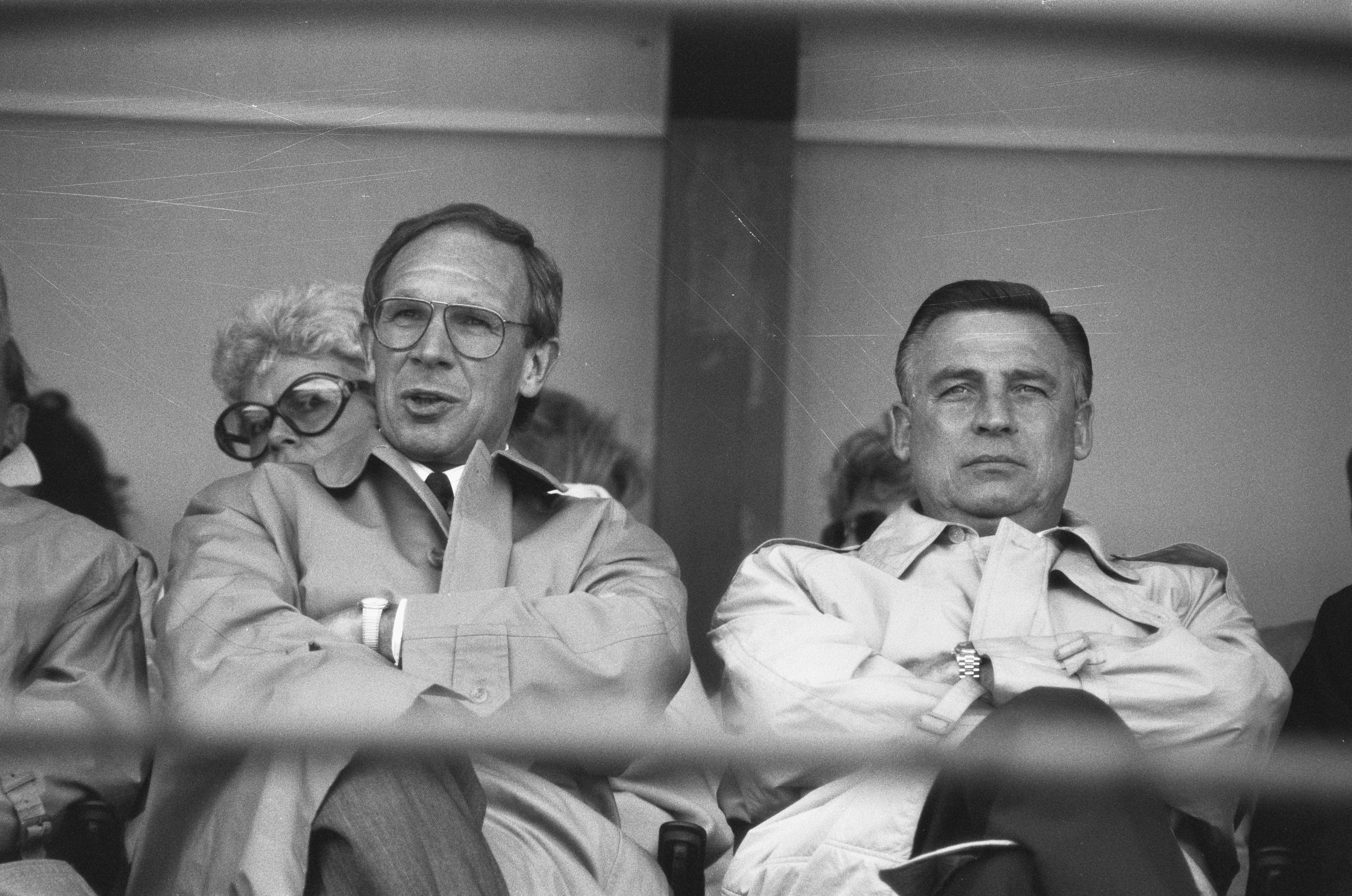 Collectie / Archief : Fotocollectie Anefo Reportage / Serie : [ onbekend ] Beschrijving : Feyenoord tegen Ajax, nieuw algemeen directeur Hans Kraay (l) met Gerard Kerkum op tribune Datum : 24 april 1988 Locatie : Rotterdam Trefwoorden : voetbal Persoonsnaam : Kerkum, Gerard, Kraay, Hans Instellingsnaam : Feyenoord Fotograaf : Bogaerts, Rob / Anefo Auteursrechthebbende : Nationaal Archief Materiaalsoort : Negatief (zwart/wit) Nummer archiefinventaris : bekijk toegang 2.24.01.05 Bestanddeelnummer : 934-2351